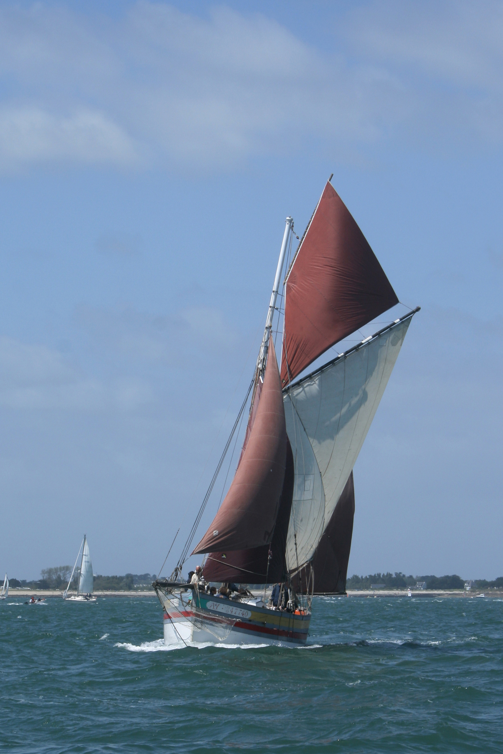 Madelynn